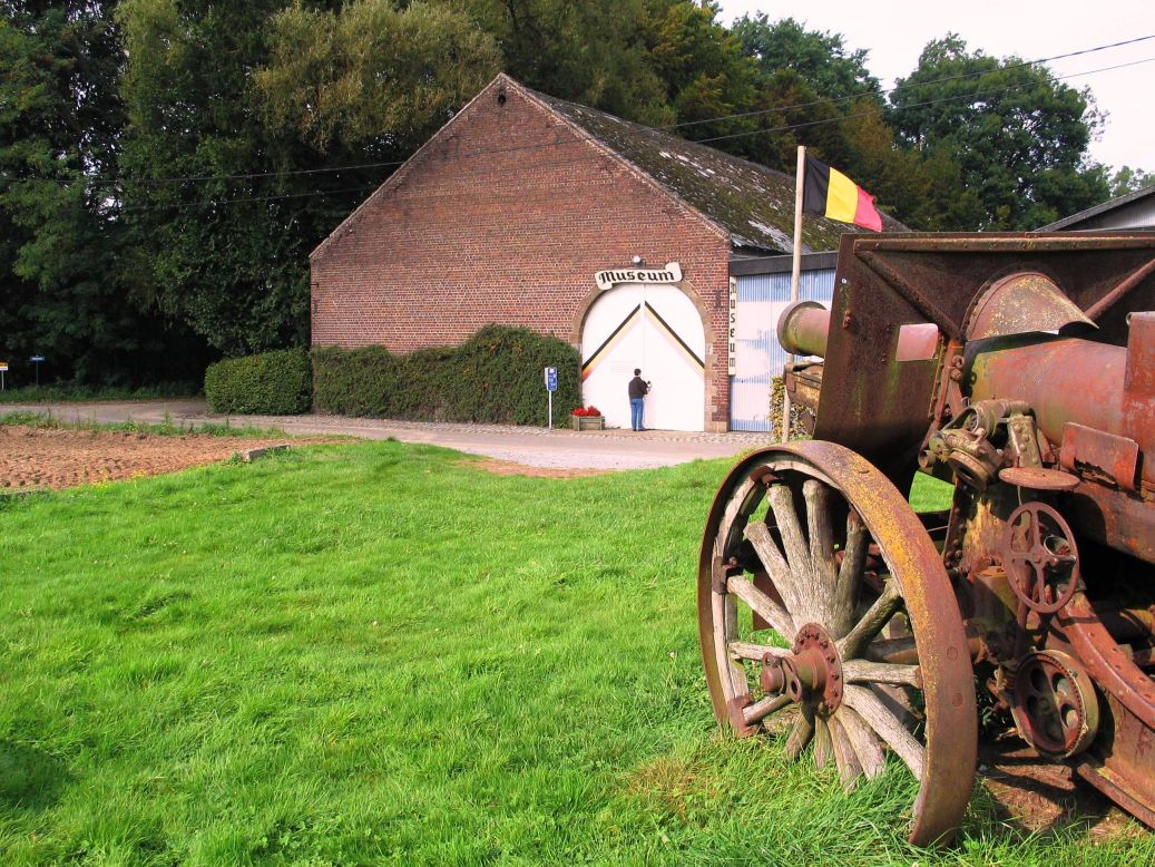 Museum te Halen - eigen foto